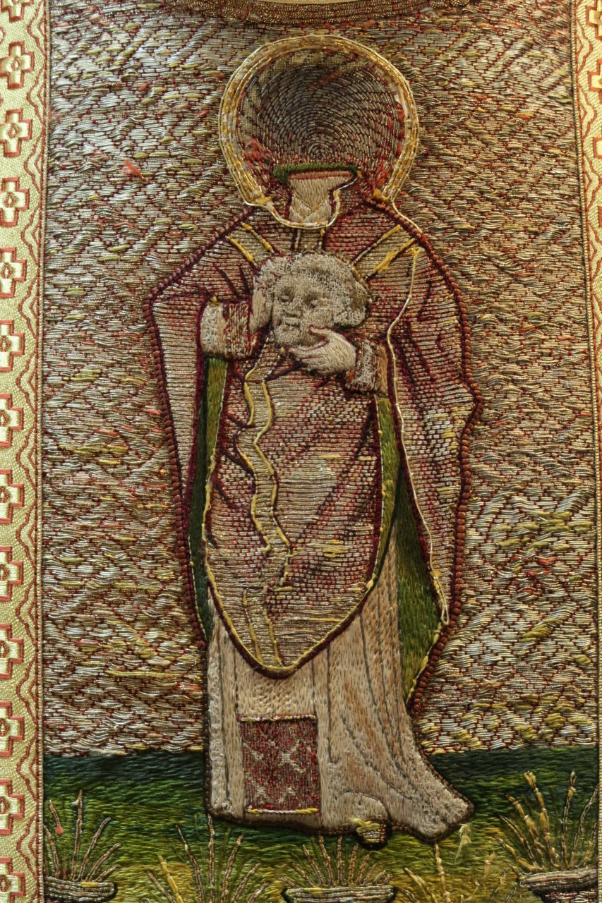 St. Dionysius (Paramentensammlung St. Dionysius Rheine)